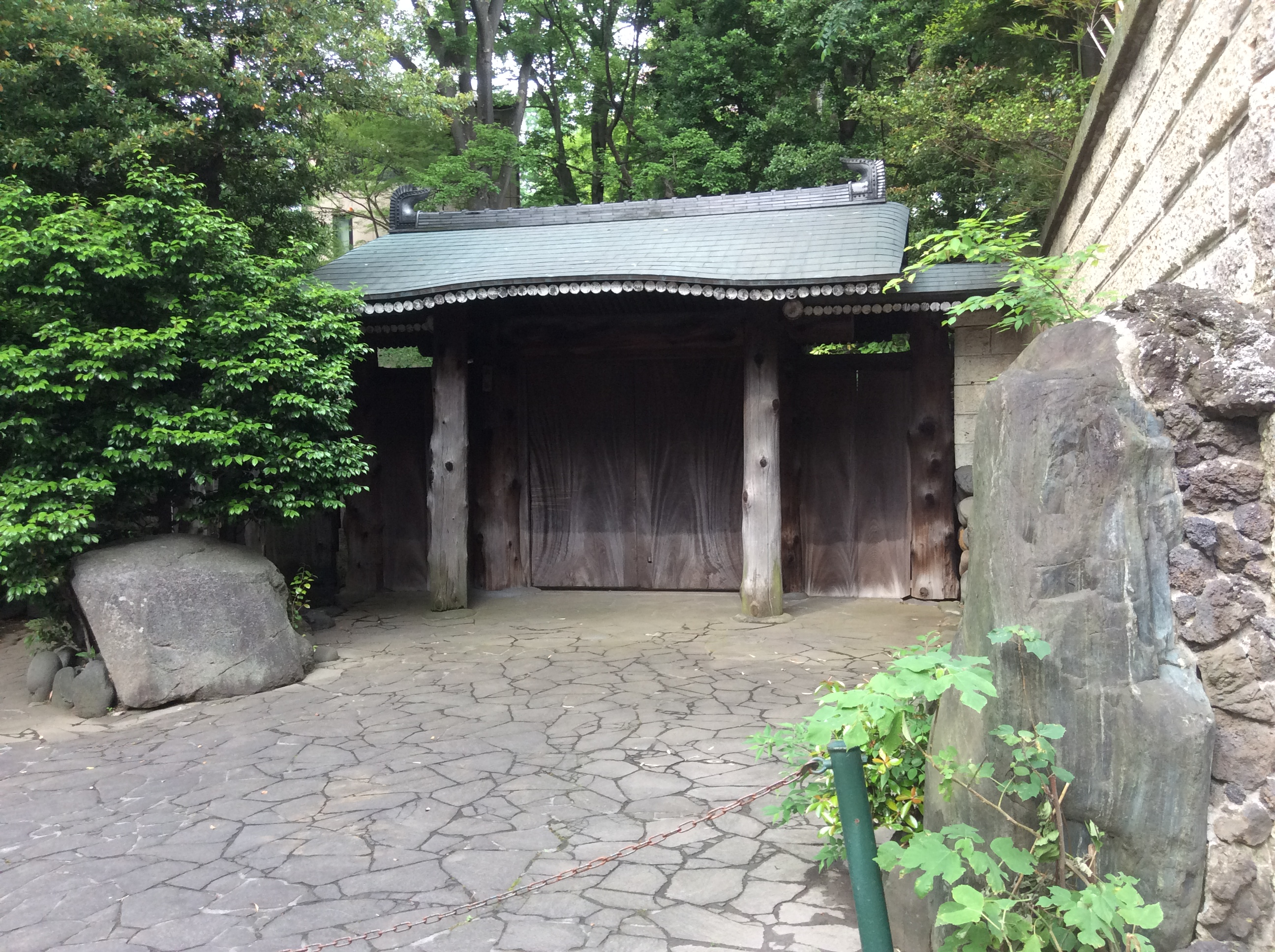 （2015年5月16日撮影）